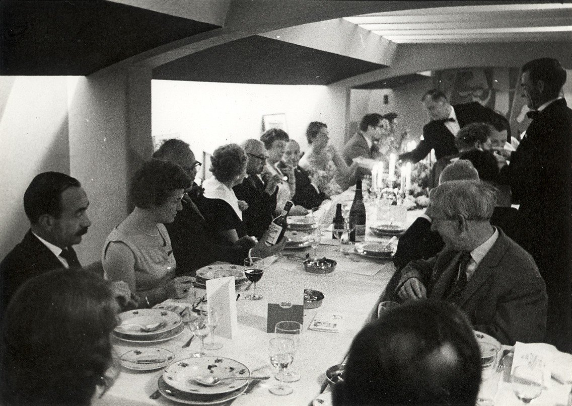 CollectieCollectie Fotoburo de BoerInventarisnummerNL-HlmNHA_54011259BeschrijvingSociëteit "Teisterbant", 1ste van links is Herman van Run (journalist). Aangekocht in 1976 van fotograaf C. de Boer. Identificatienummer 54-011259FotonummerKNA006009567DocumenttypeHistorieprenten, tekeningen en foto'sVervaardigerBoer, Cees de (1918-1985) Naam objectSociëteit "de Kroon / BrinkmannInterieur/ExterieurInterieurAnnotatiesC056.002 54/55-057 12249LandNederland ProvincieNoord-Holland GemeenteHaarlem PlaatsHaarlem StraatGrote Markt Begindatum1960Einddatum1960TechniekFoto Trefwoordencafé, restaurant CopyrighthouderNoord-Hollands Archief